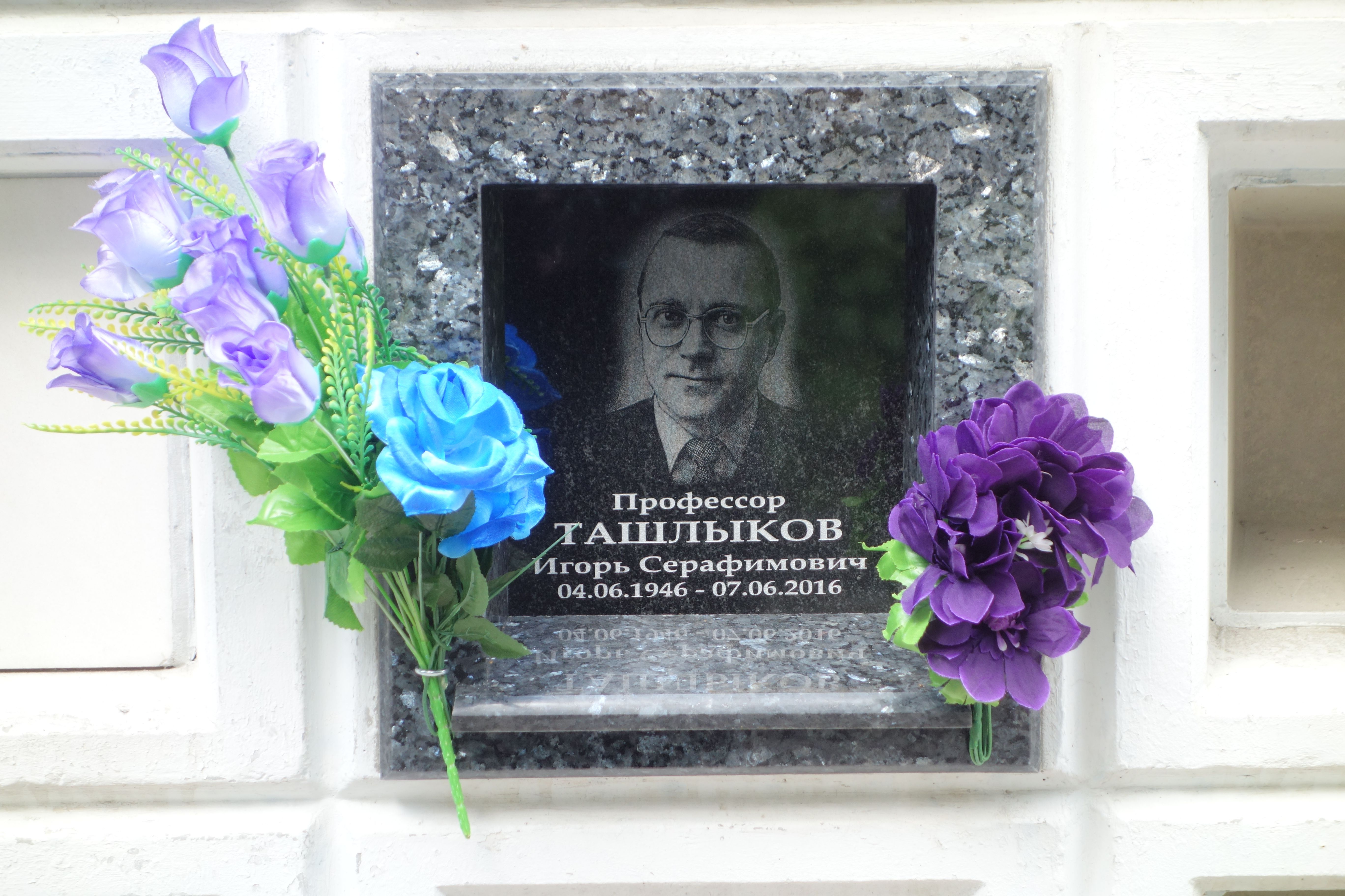 Захоронение И. С. Ташлыкова на почетном участке № 114 колумбария Восточного кладбища Минска